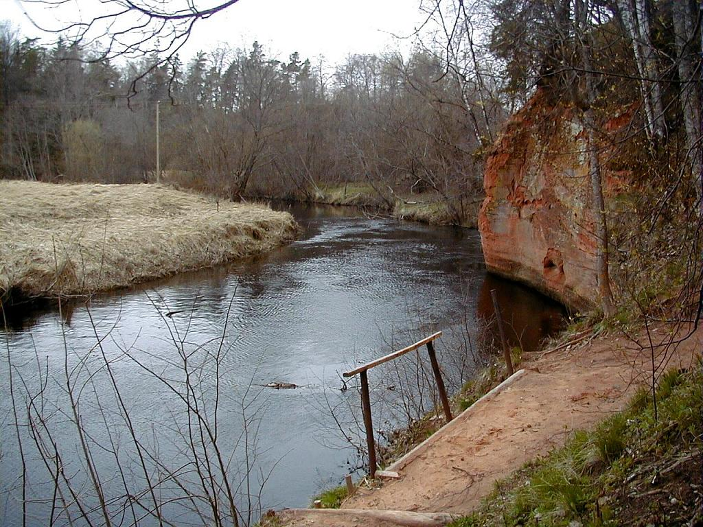 Svētupe pie Kuiķules. 2003-05-01